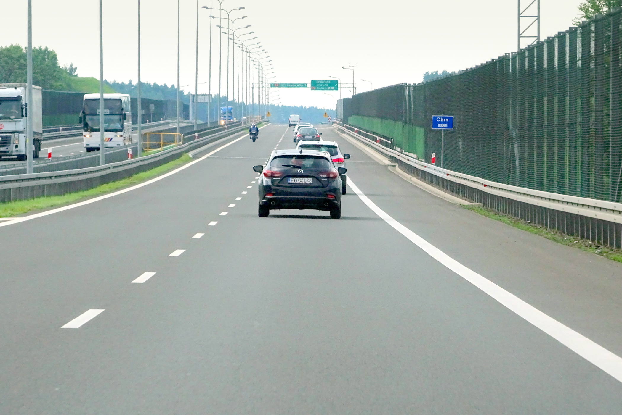 Most na Obrze. Droga ekspresowa S3 w rejonie Skwierzyny, na odcinku Gorzów Wlkp.-Międzyrzecz.